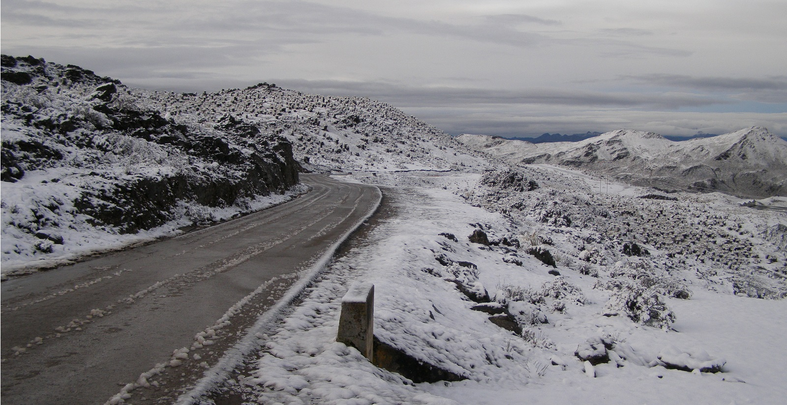 Carretera al Pico El Águila, Mérida, Venezuela